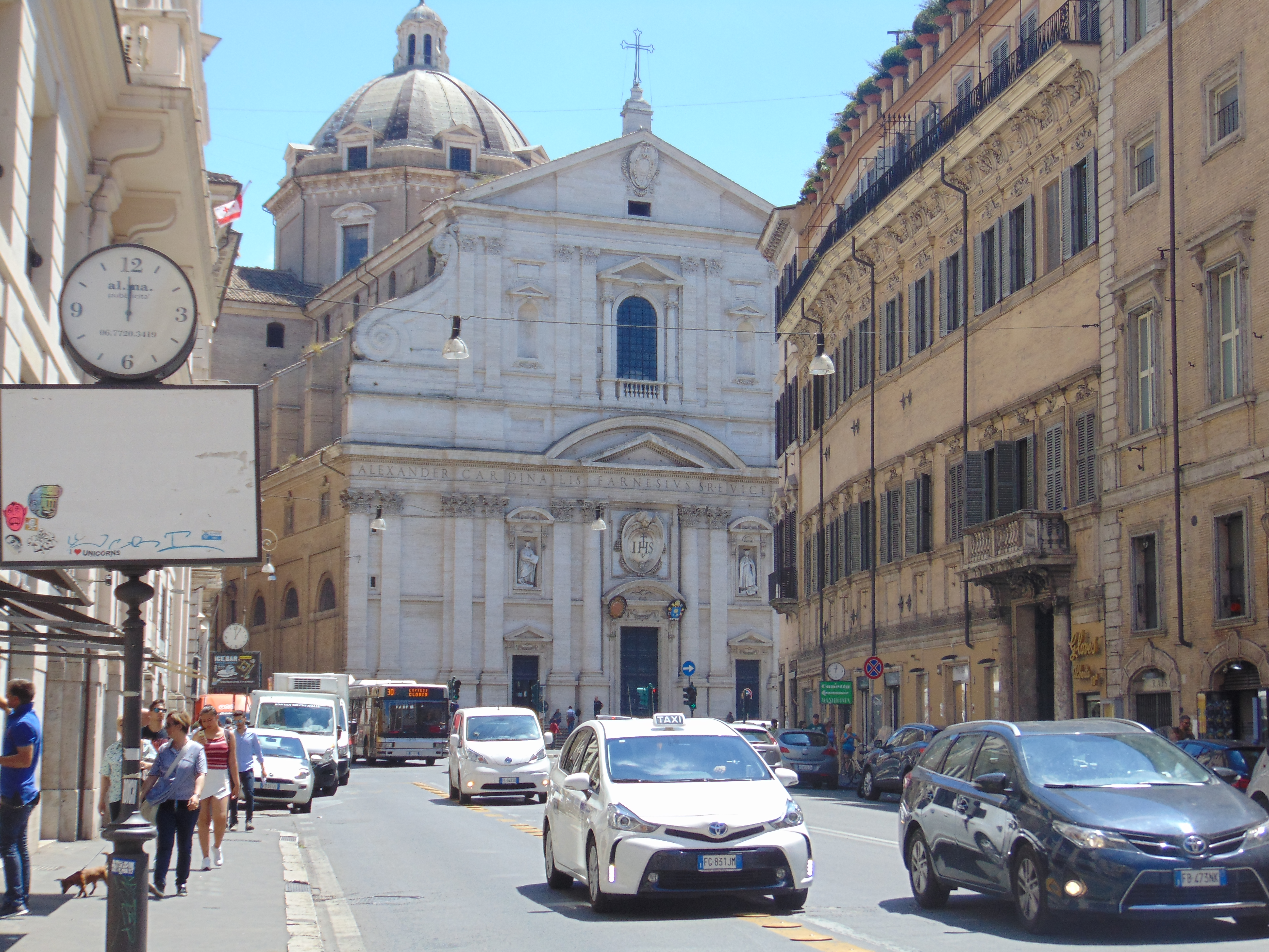 Chiesa del Gesù